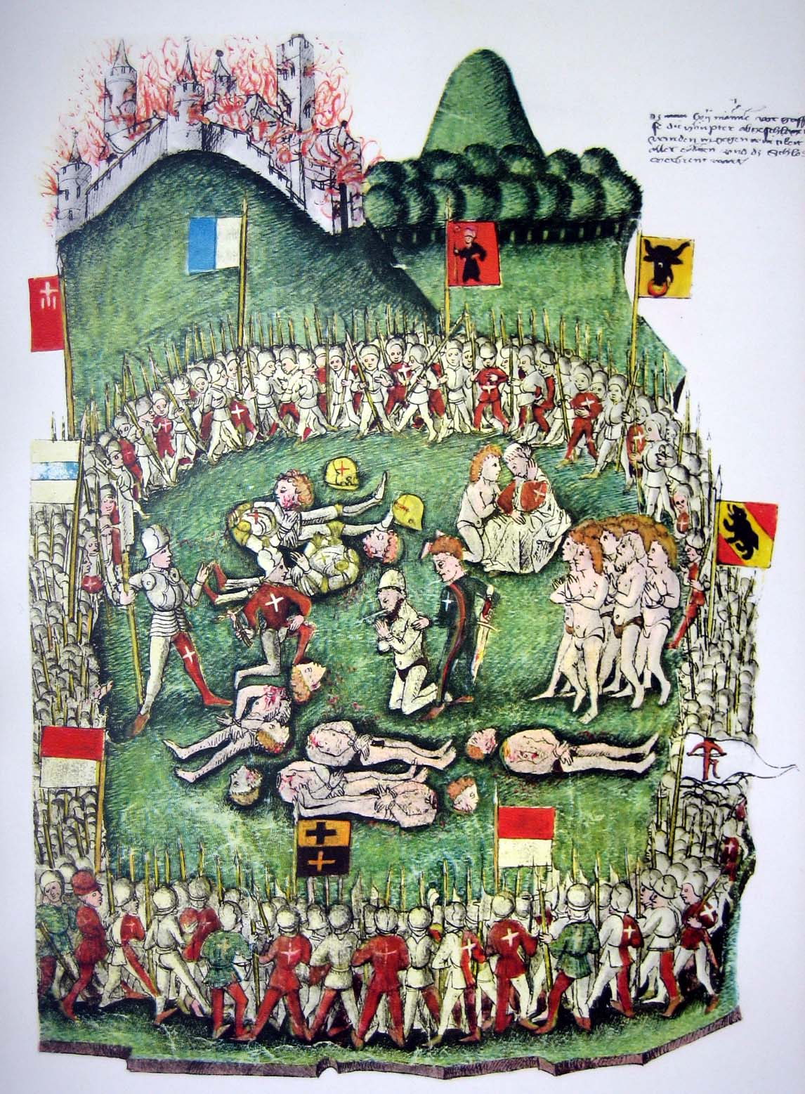 Der Mord von Greifensee oder Bluttat zu Greifensee, 1444. kolorierte Federzeichnung